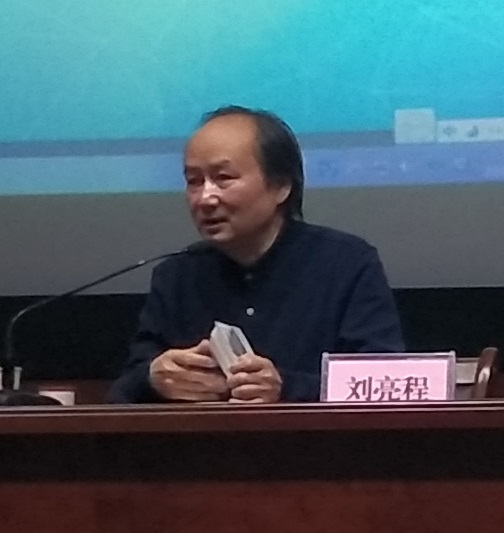 刘亮程，中国作家，代表作《一个人的村庄》